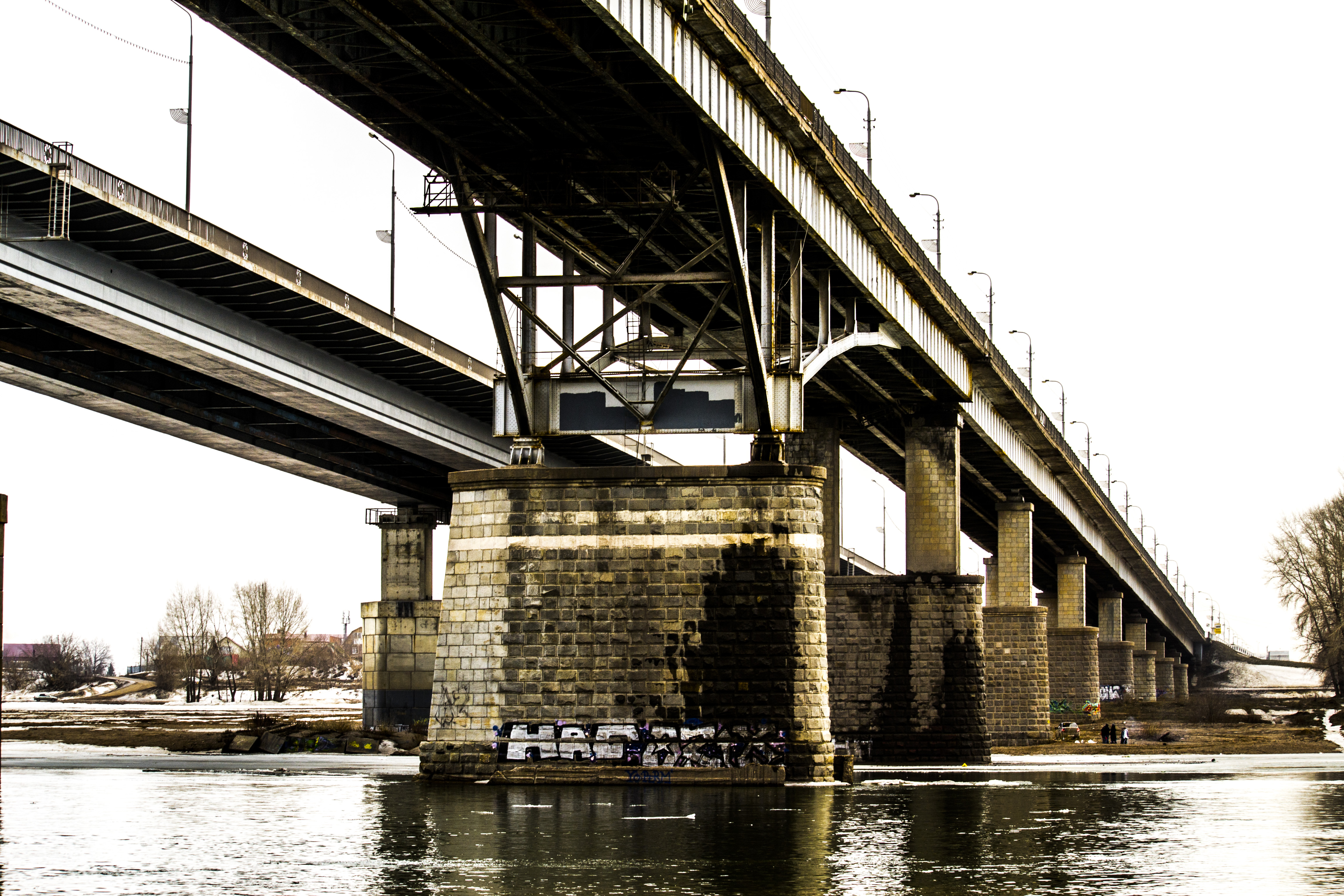 bridge